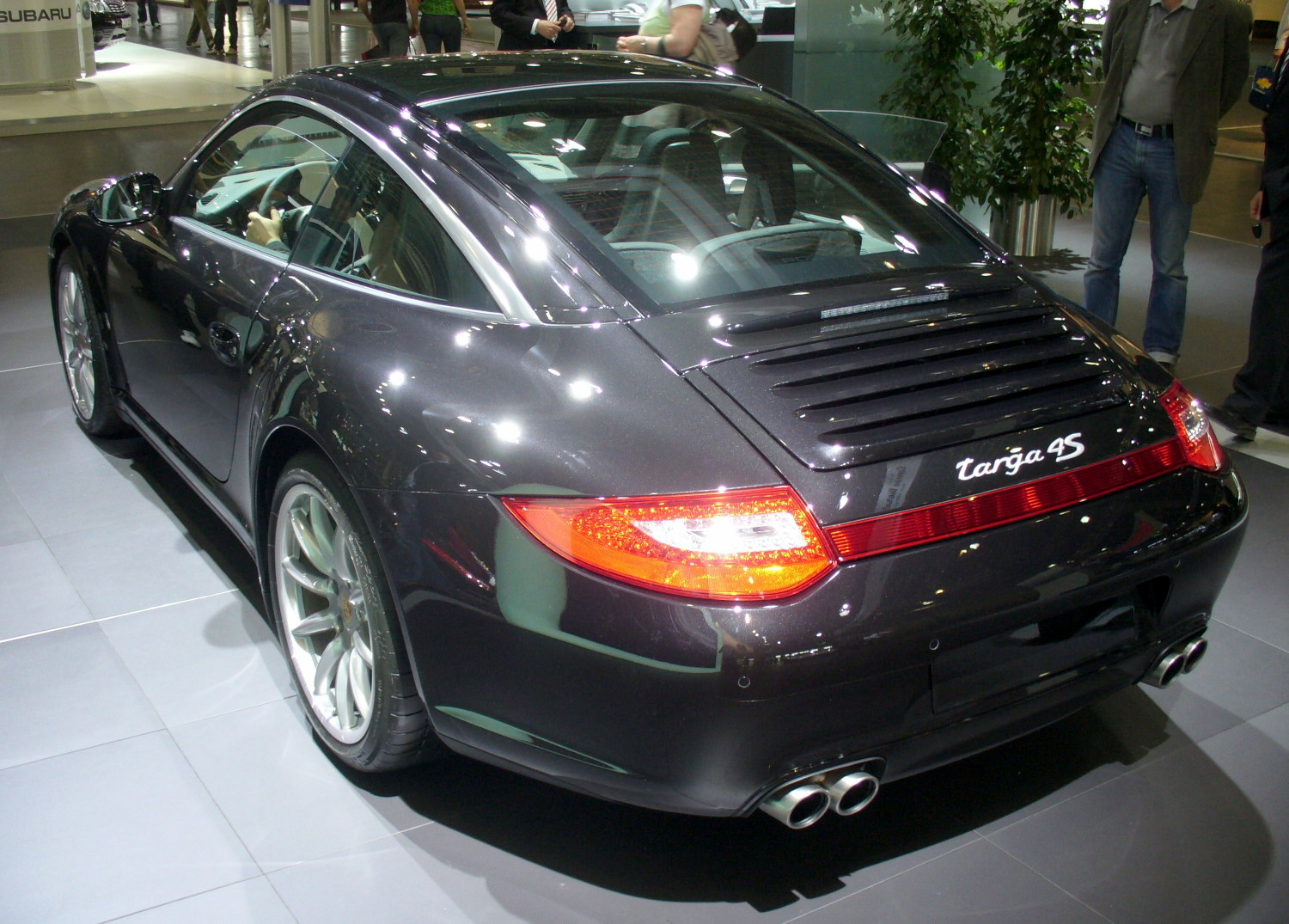 Porsche 997 Targa Facelift